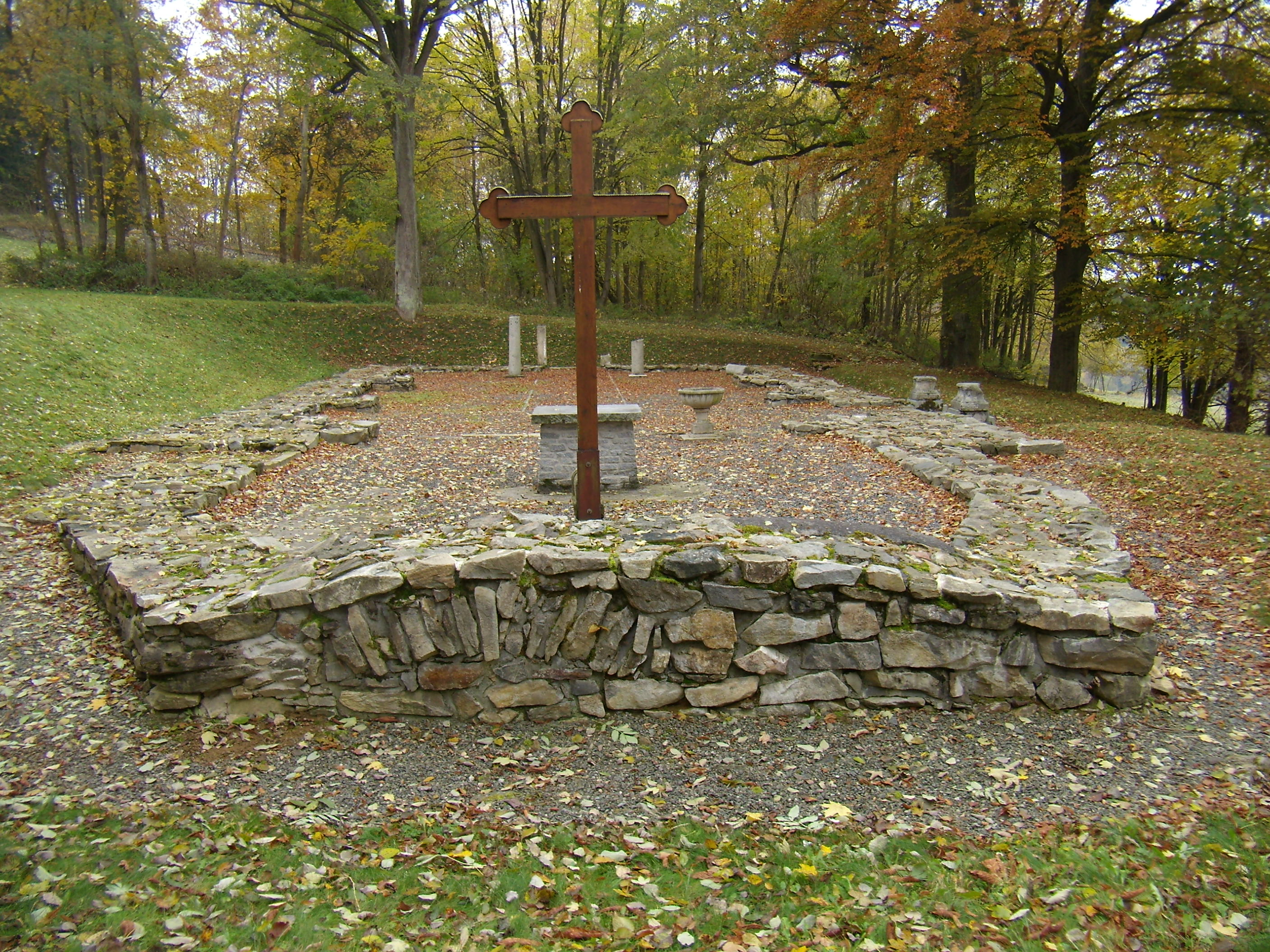 Červené Dřevo - bývalý kostel Bolestné Matky Boží